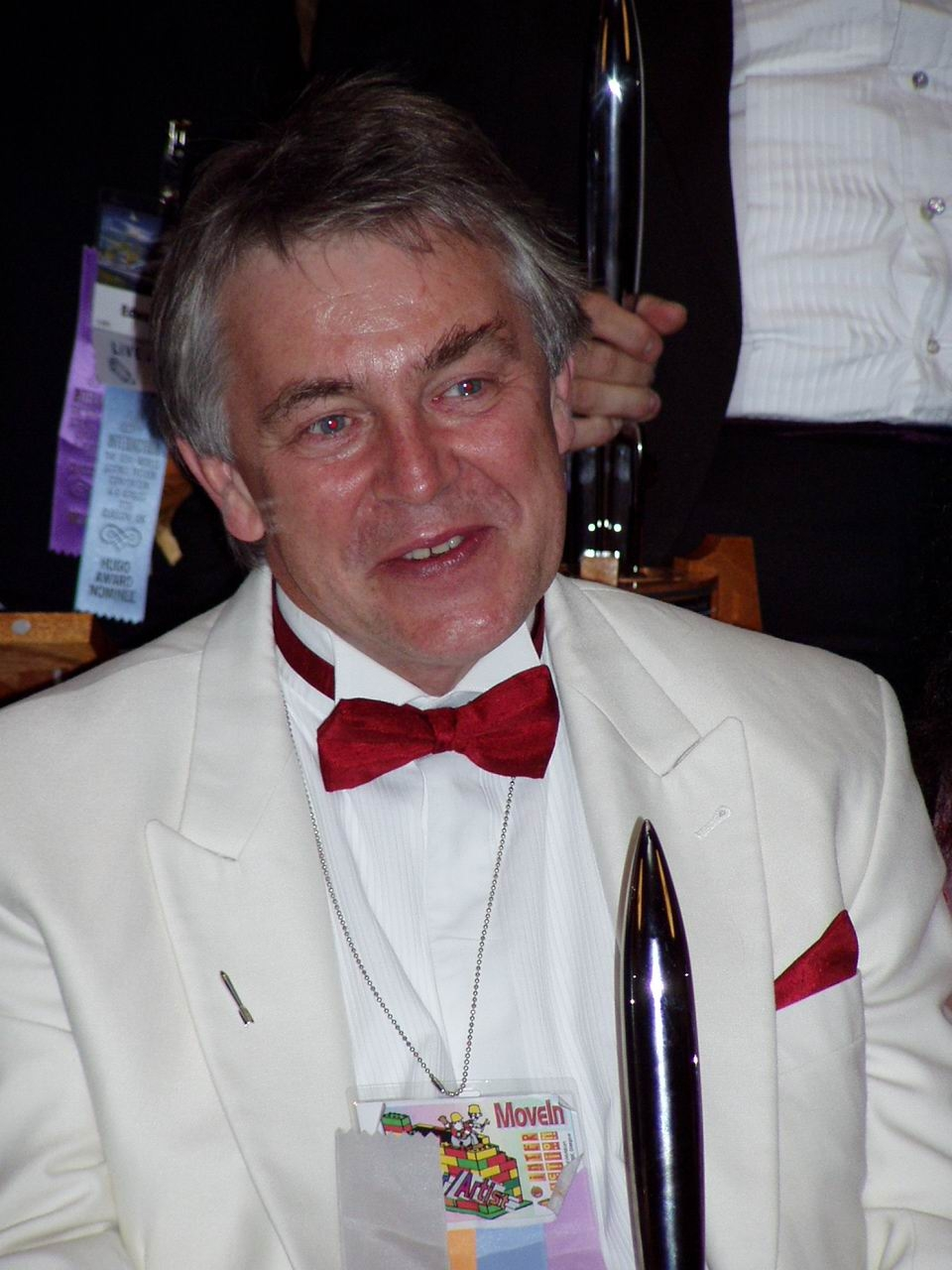 Jim Burns na Worldconie 2005 w Glasgow w sierpniu 2005. Zdjęcie autorstwa Szymona Sokoła.